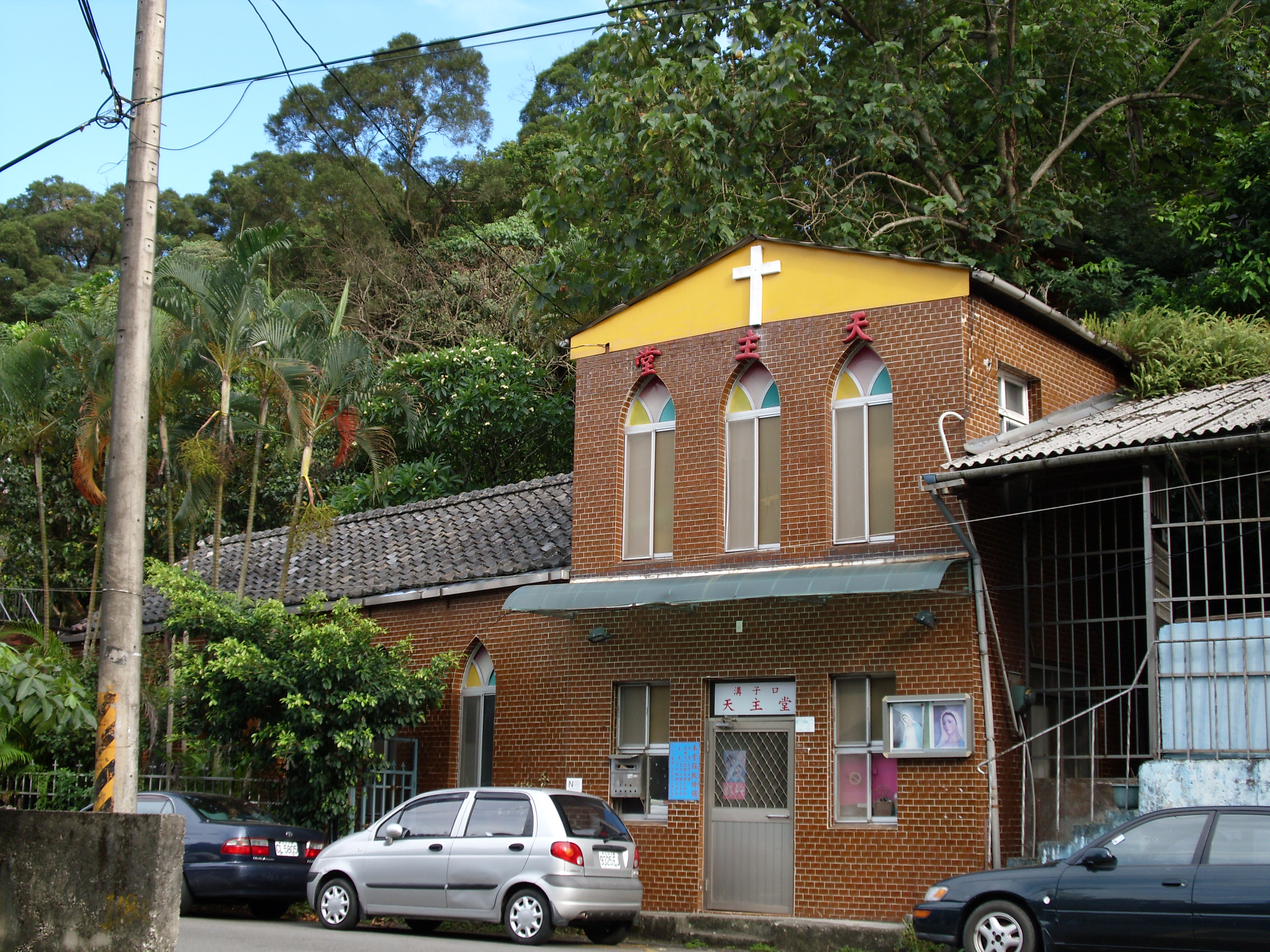 Bân-lâm-gú: 天主教台北總教區溝仔口天主堂。中文（台灣）: 天主教台北總教區溝子口天主堂。